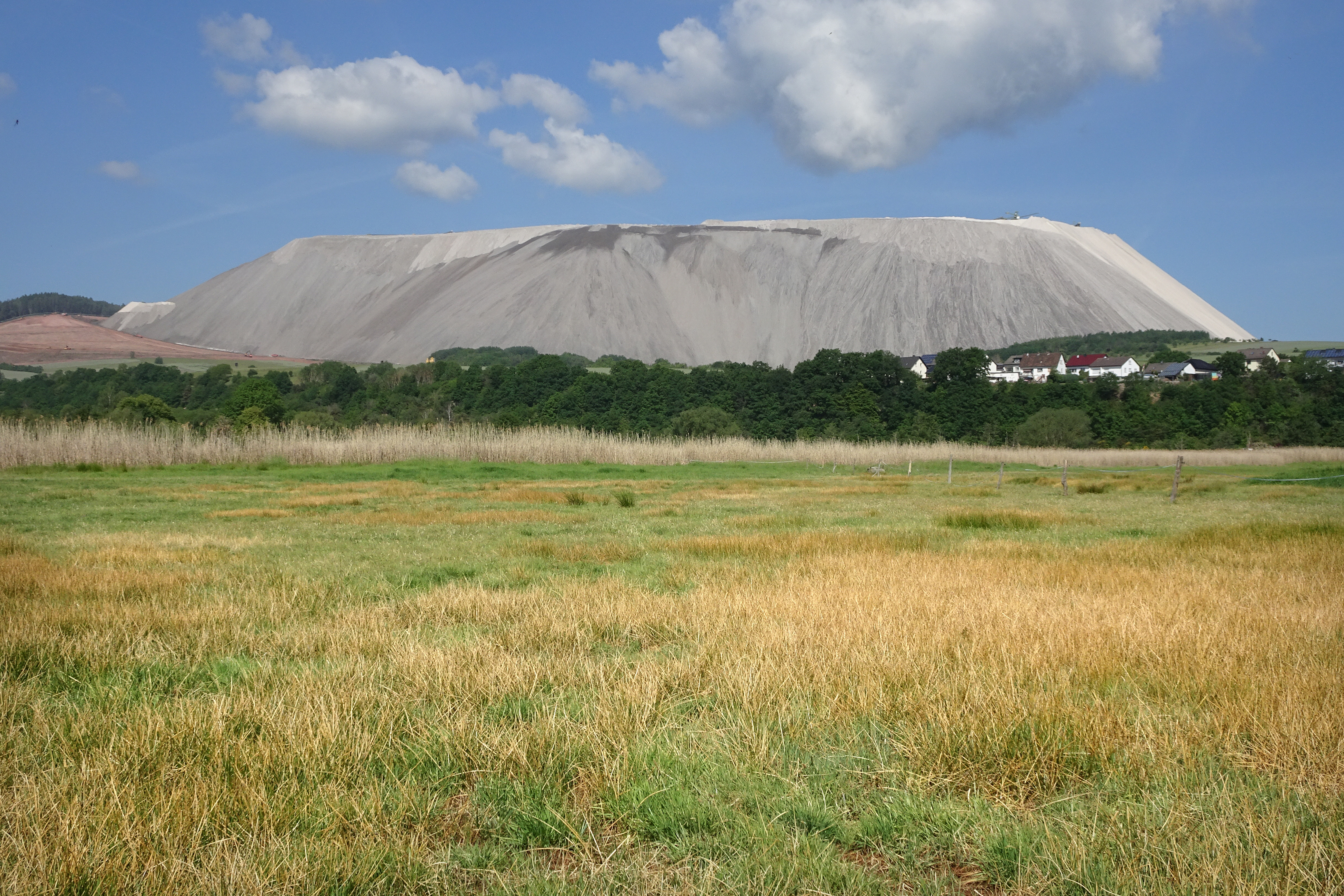 Die „Rohrlache von Heringen“ liegt in den Gemarkungen der Ortsteile Widdershausen, Leimbach und Heringen der Stadt Heringen im osthessischen Landkreis Hersfeld-Rotenburg. Der Auenbereich im Werratal, in der Nähe der Landesgrenze zu Thüringen, besitzt eine artenreiche Salzflora von hoher ökologischer Bedeutung. Hier ist mit Salzpfannen und Salzwiesen eine der größten Salzstellen des Binnenlands. Bemerkenswert ist die hohe Zahl von Vogelarten, die die Rohrlache als Brut- und Rastplatz sowie als Gebiet für die Nahrungssuche nutzen. Die Rohrlache wird als ein seltenes Beispiel für einen schützenswerten Landschaftsbereich angesehen, bei dessen Entwicklung natürliche Ursachen mit den Auswirkungen industrieller Tätigkeit zusammenwirkten. Im Juli 1979 wurde die Rohrlache zum Naturschutzgebiet erklärt. Seit 2008 gehört der Bereich als Flora-Fauna-Habitat-Gebiet mit der Nummer 5026-301 und als ein Teil des EU-Vogelschutzgebiets 5026-402 „Rhäden von Obersuhl und Auen an der mittleren Werra“ zu dem europäischen Schutzgebietsnetzwerk Natura 2000. Außerdem liegt die Rohrlache in dem im Jahr 1992 ausgewiesenem Landschaftsschutzgebiet „Auenverbund Werra“. This is a picture of the protected area listed at WDPA under the ID 82435